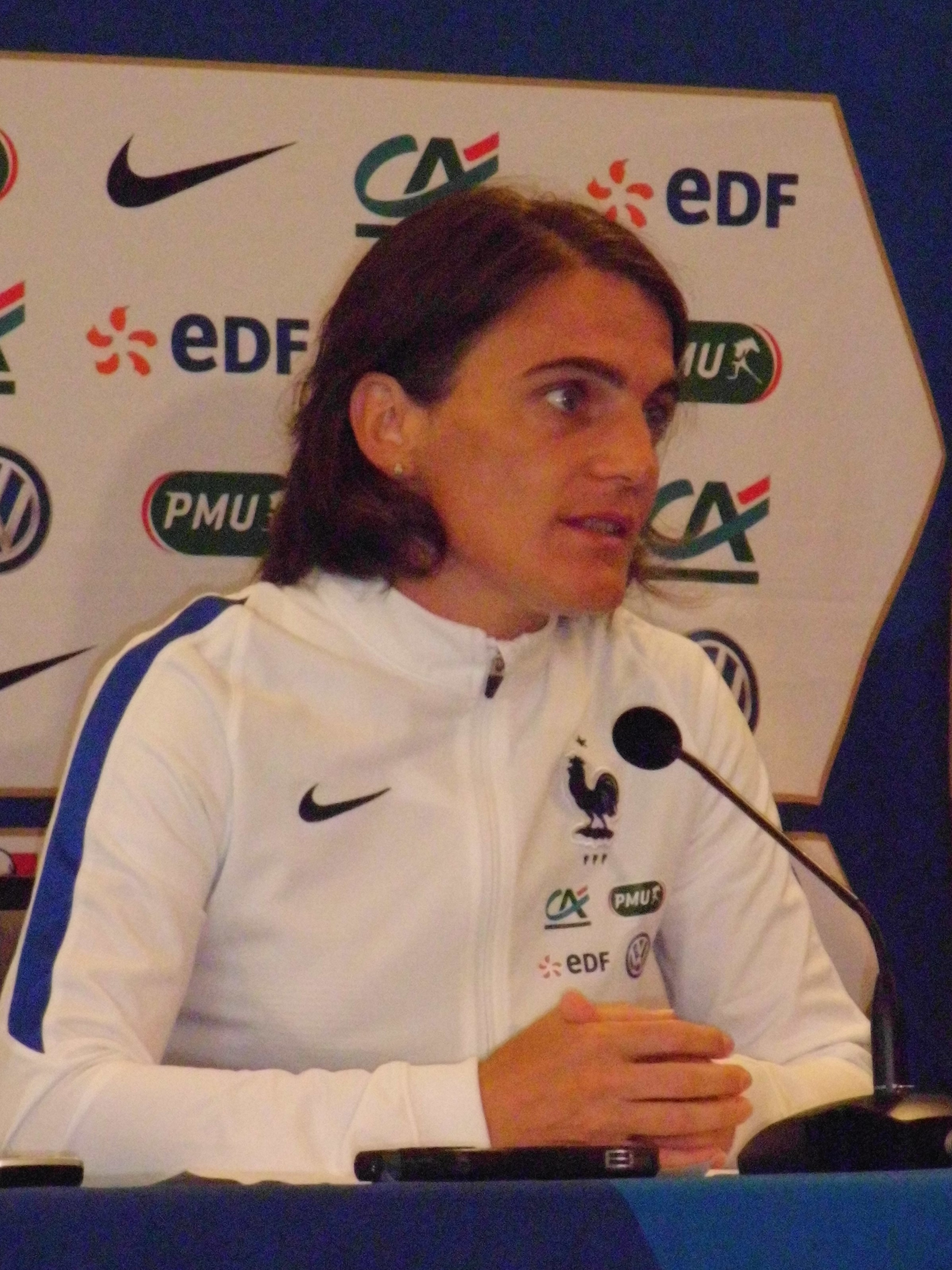 Peggy Provost während der Pressekonferenz im Zwijndrechter Frauschaftshotel vor dem EM-Viertelfinale gegen England